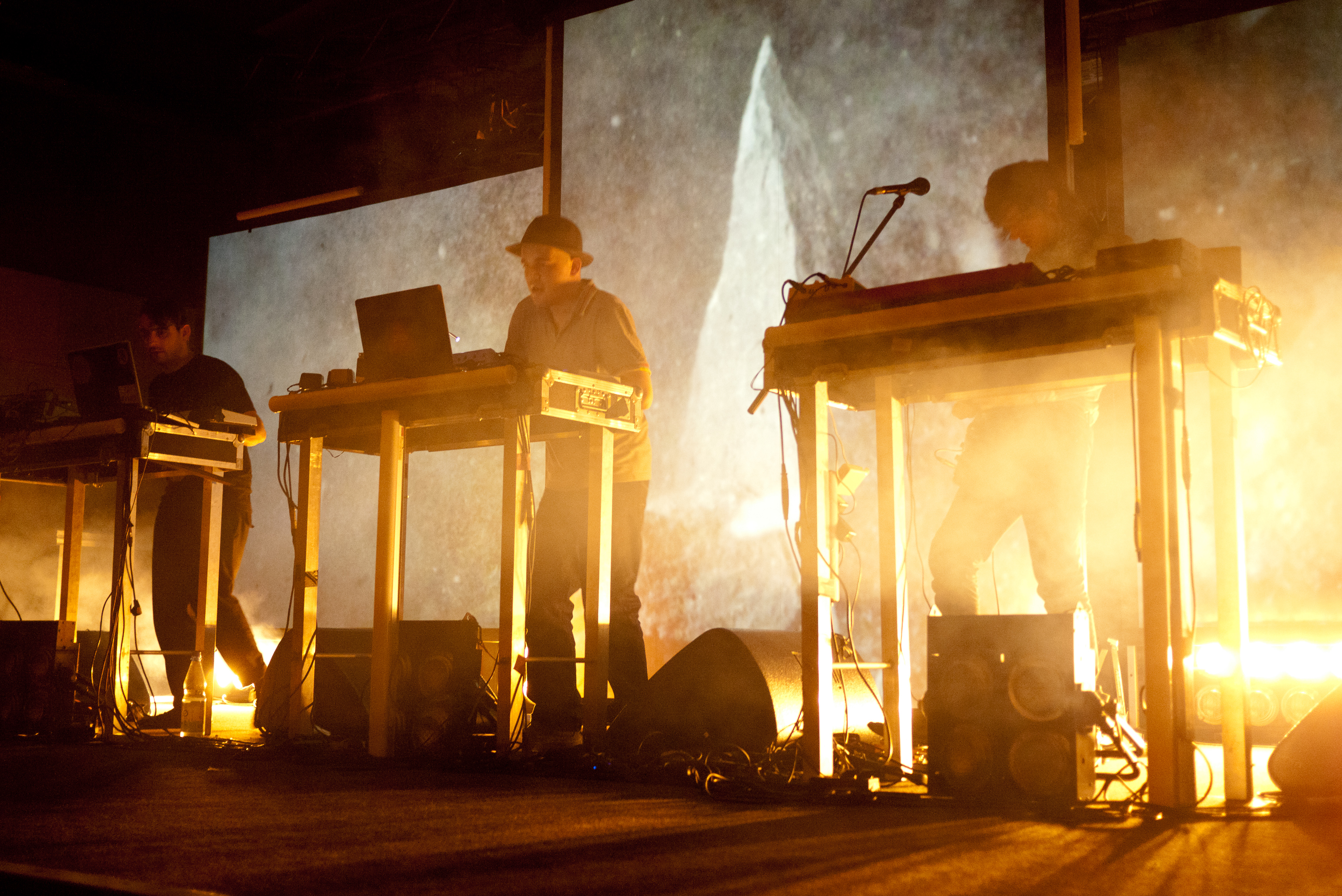 Moderat